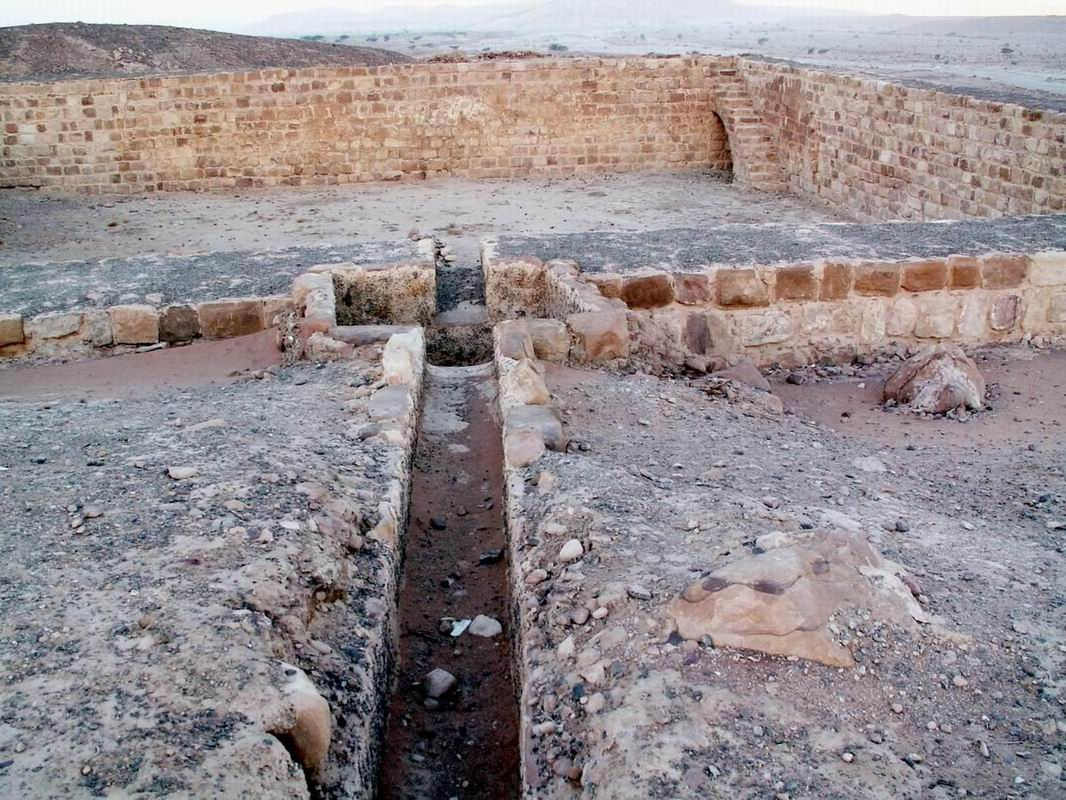 ancient Punon water reservoir. on top right, the Feinan river can be seen. מאגר המים הגדול של פונון. מצד ימין למעלה נראה נחל פינן שמימיו זורמים כל השנה photo by Uri Juda